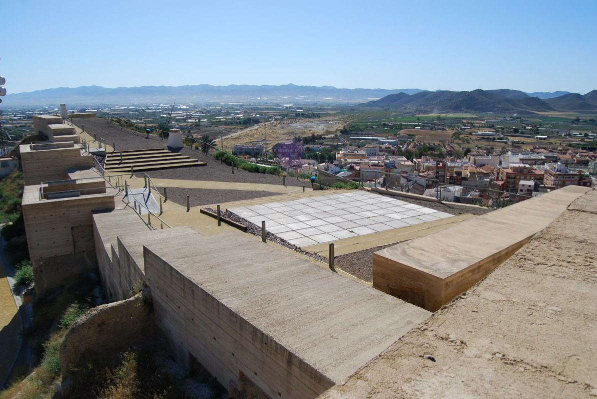 Vista del recinto inferior del Castillo de Nogalte